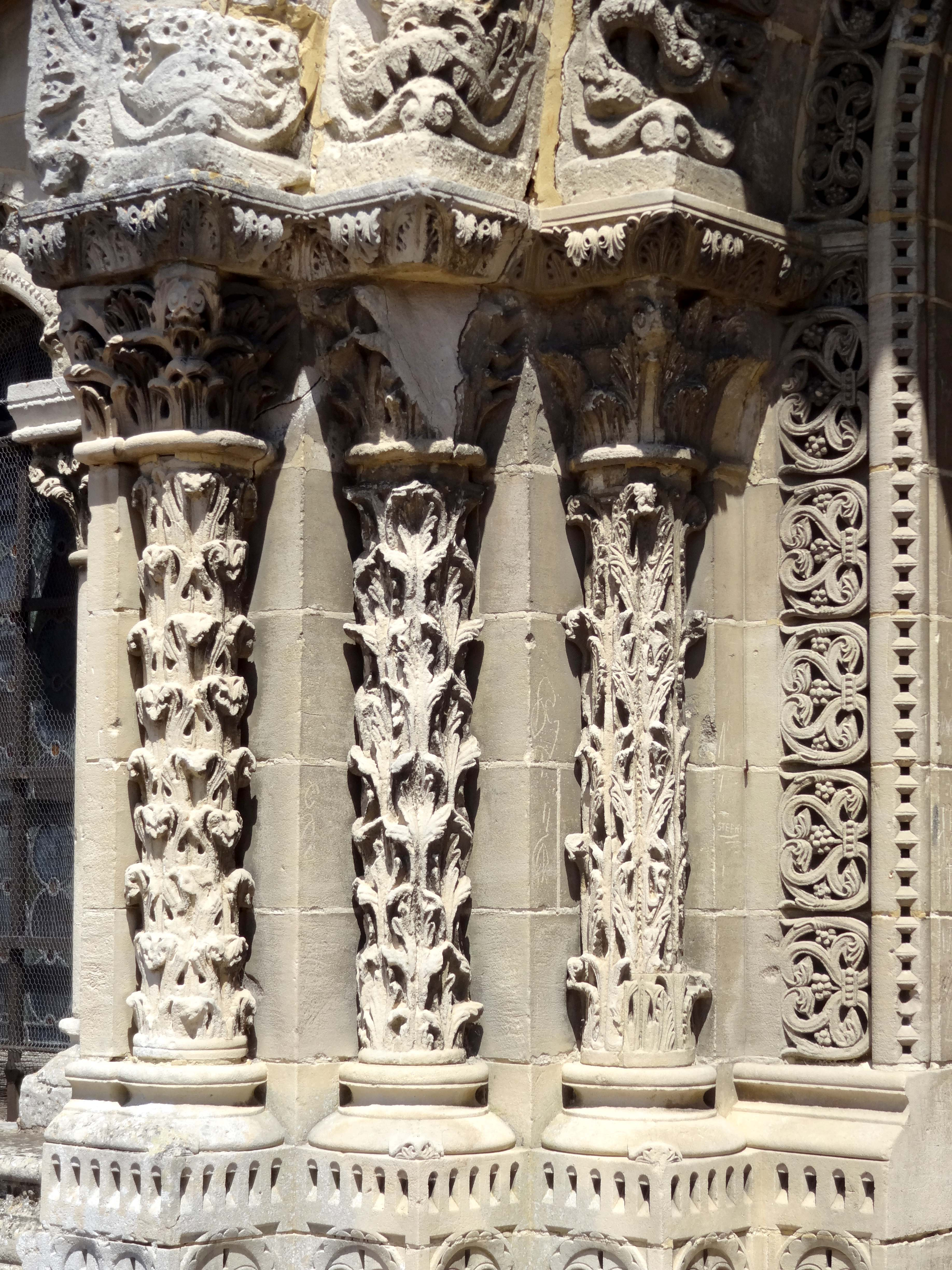 Église Sainte-Madeleine de Trie-Château - voir titre.